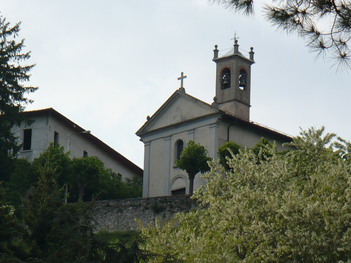 La Chiesa di San Michele di Trevano di Uggiate